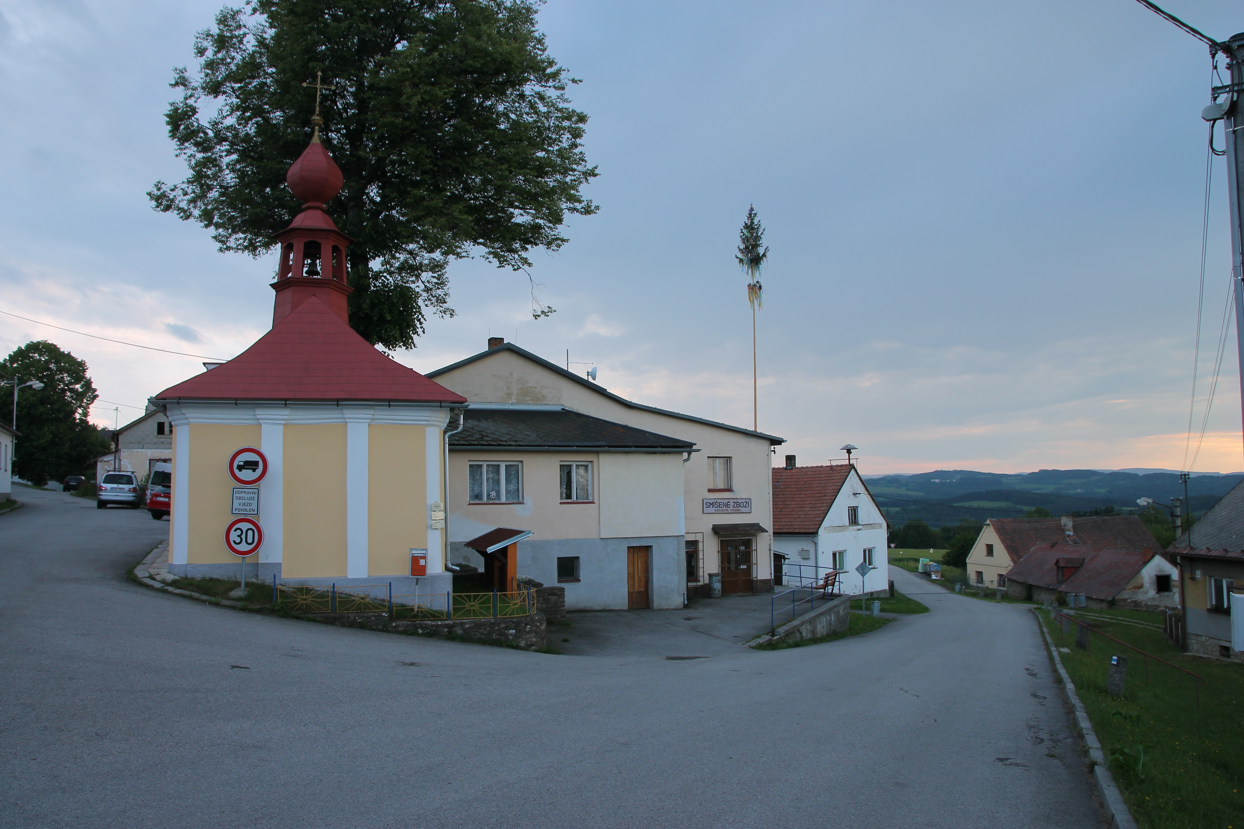 Štítkov, Svatá Maří